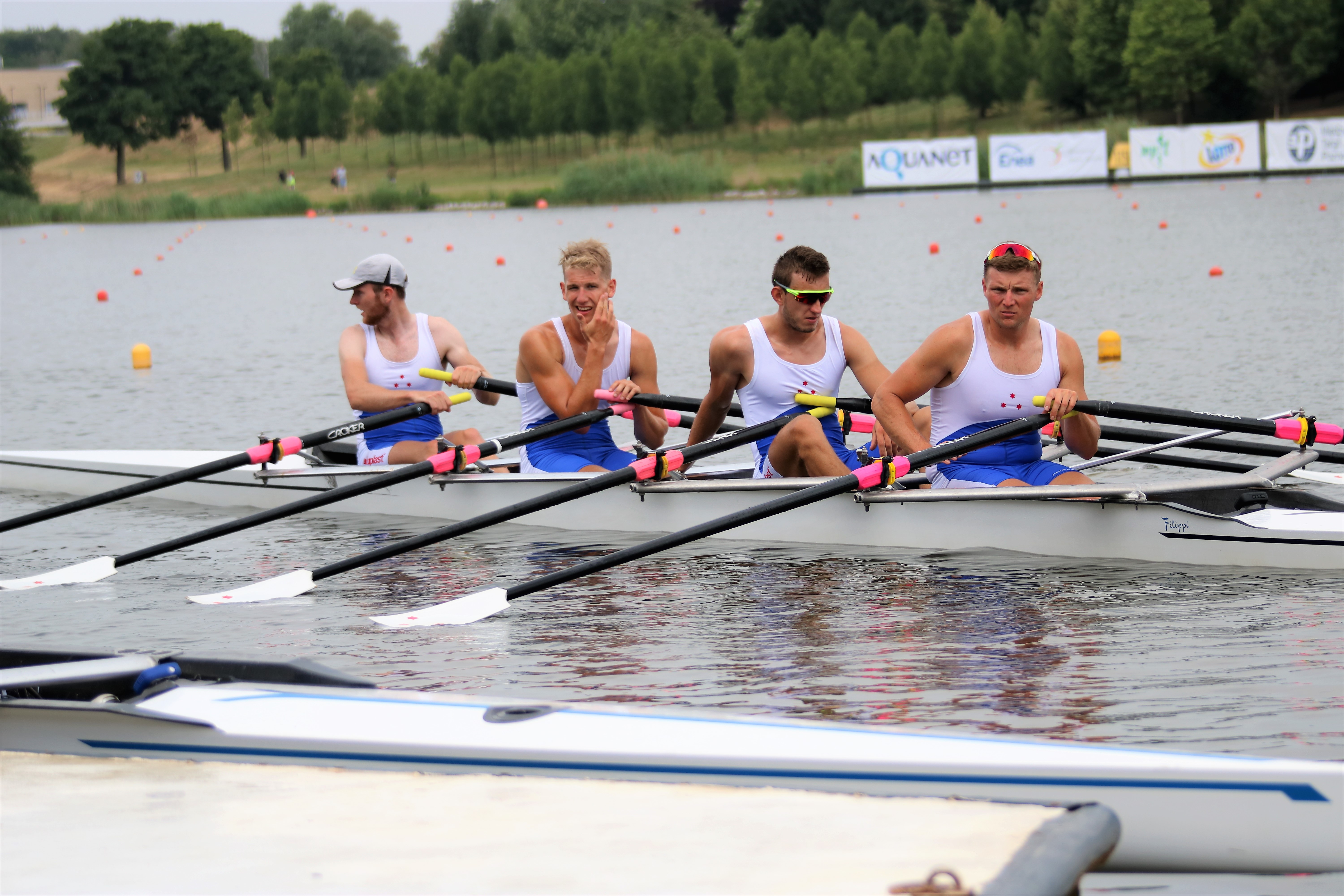 Mistrzostwa Polski Seniorów, Poznań (10.06.2018) srebrni medaliści biegu 4xMA - osada KW04 Poznań(A. Wicenciak, D. Pieniak, D. Rewers, M. Świętek)